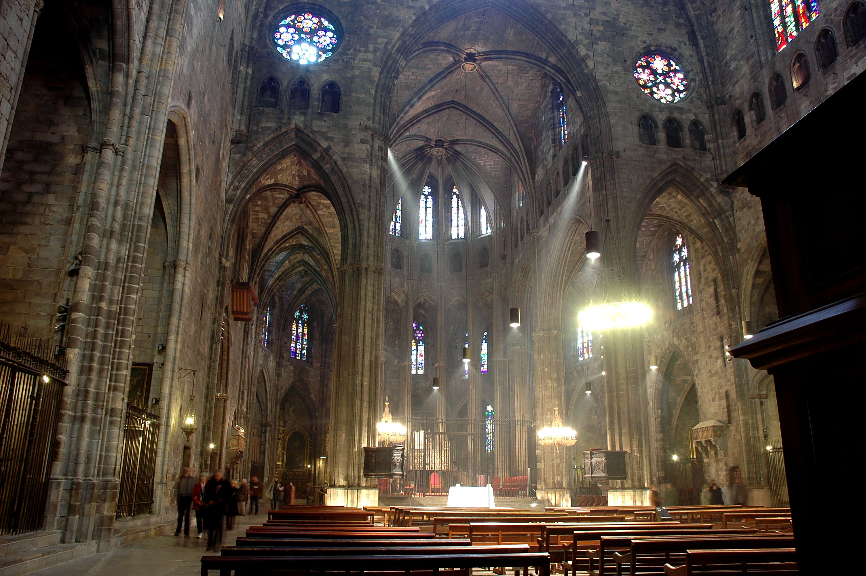 Catedral de Girona - Nau central